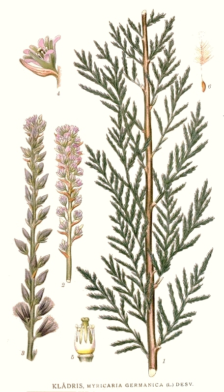 Original Description Klådris, Myricaria germanica (L.) Desv.